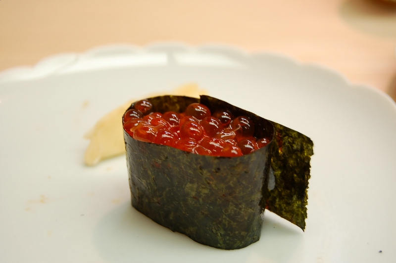 寿司・いくらの軍艦巻き（京都市東山区祇園「鮨割烹 なか一」）